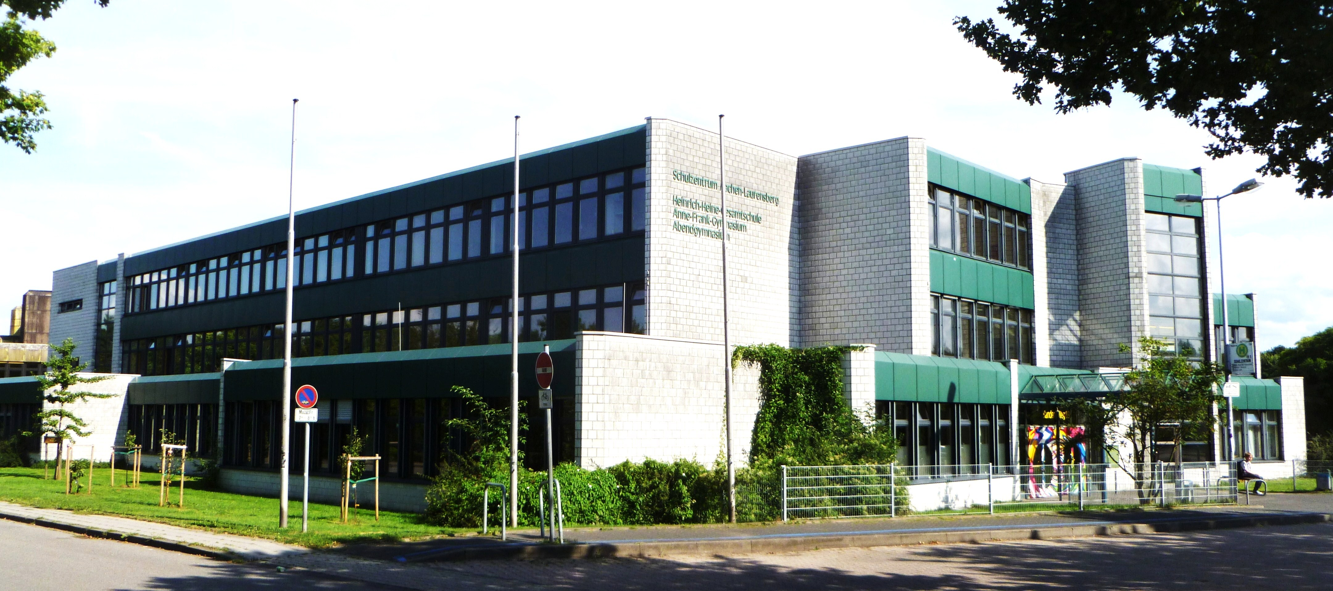 Schulzentrum Laurensberg